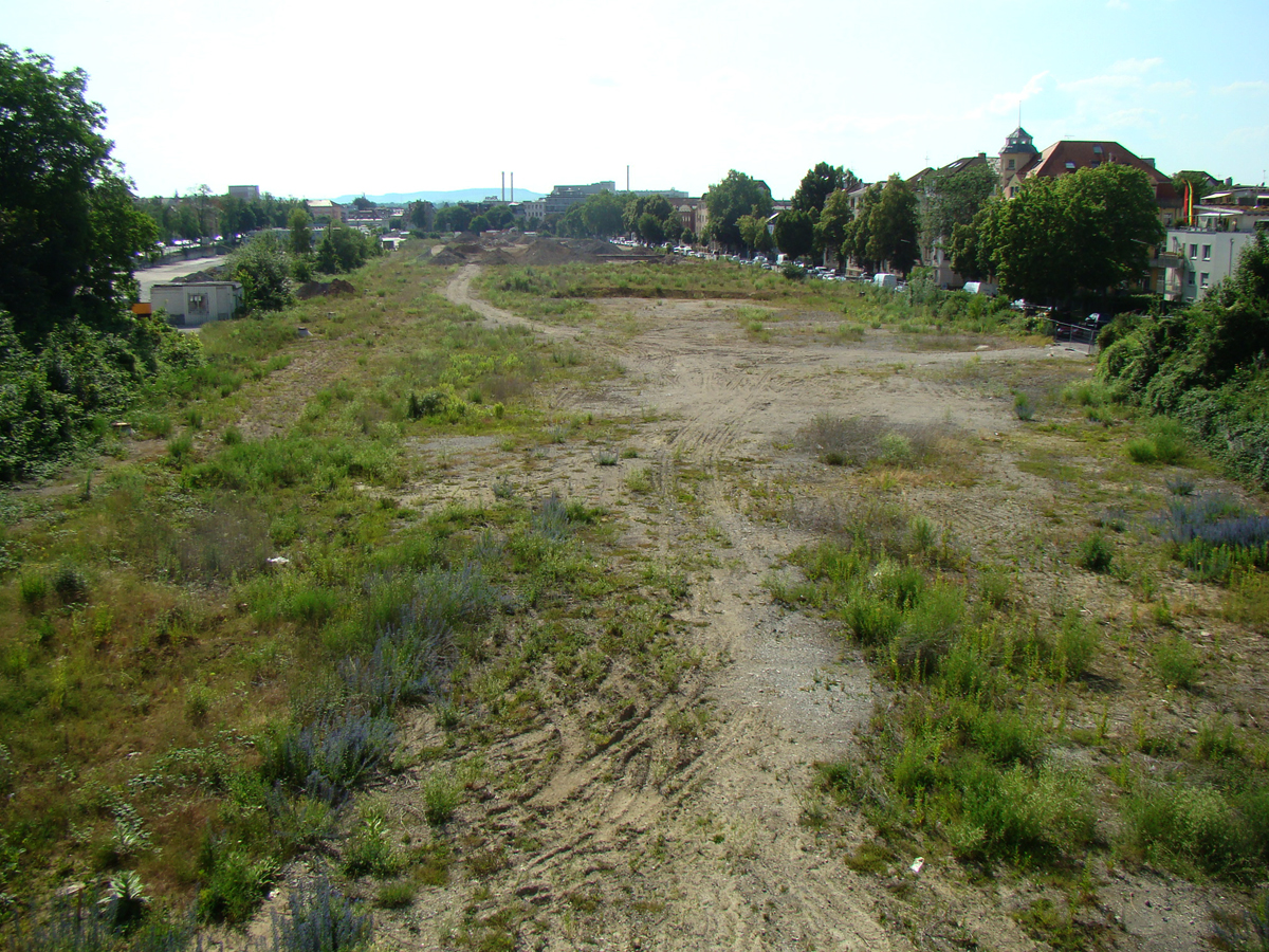 Brachfläche des ehemaligen Südbahnhofs in Heilbronn